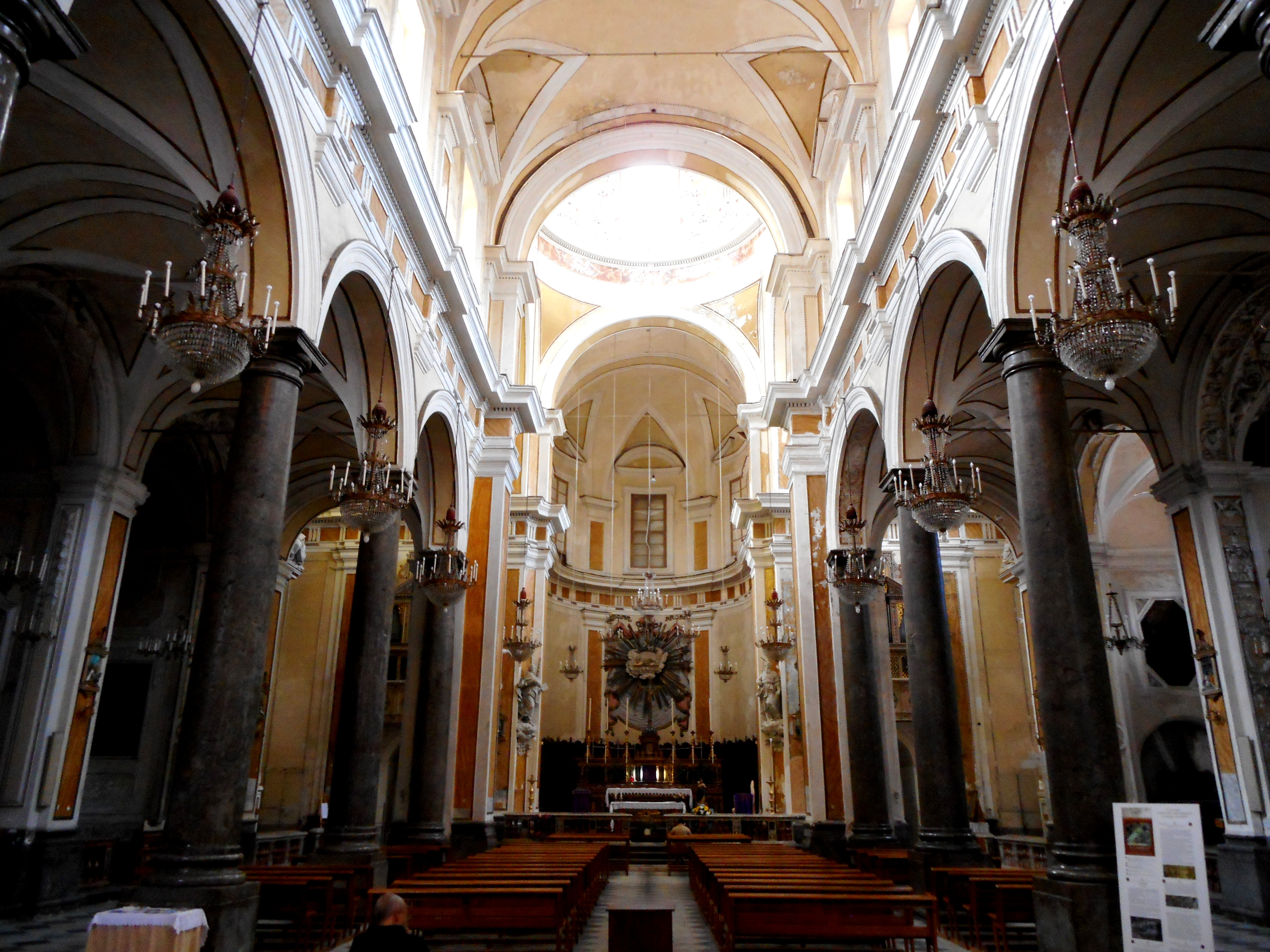 Interno della chiesa del Carmine Maggiore